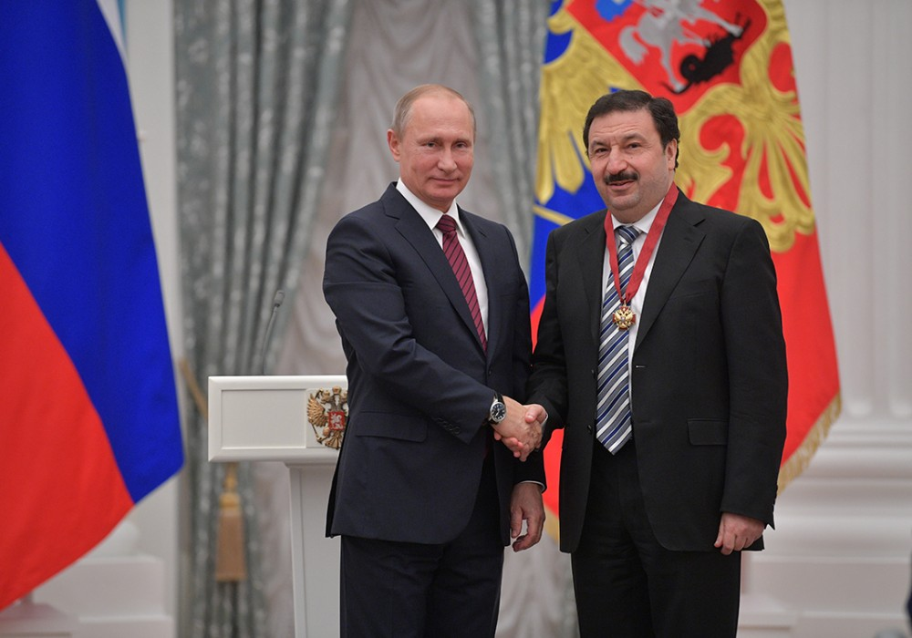 15 ноября 2017 г. Президент России Владимир Путин наградил ректора РАНХиГС Владимира Мау орденом «За заслуги перед Отечеством» III степени